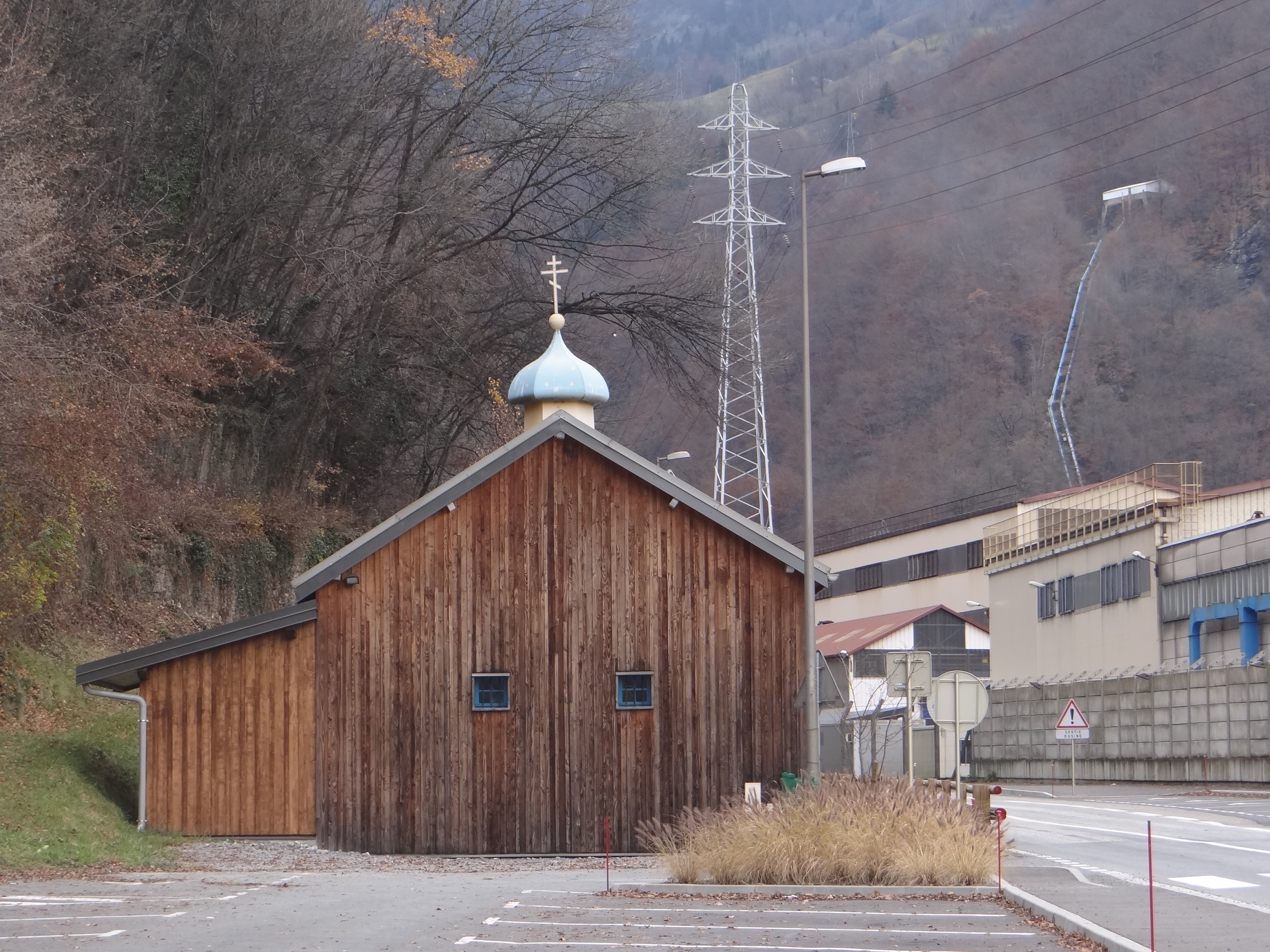 Церковь Св. Николая в г. Южин и сталелитейный завод